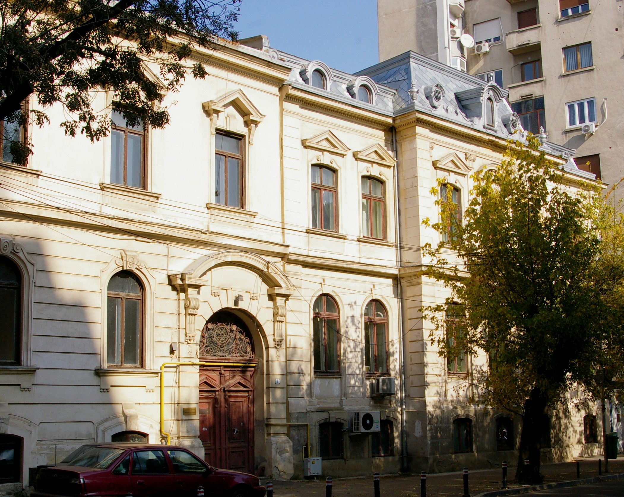 Ehemaliger Sitz der k. u. k. Gesandtschaft in Bukarest in der Strada Vienei Nr. 9, heute Strada Dobrescu I. Demetru, Sektor 1. (2012)